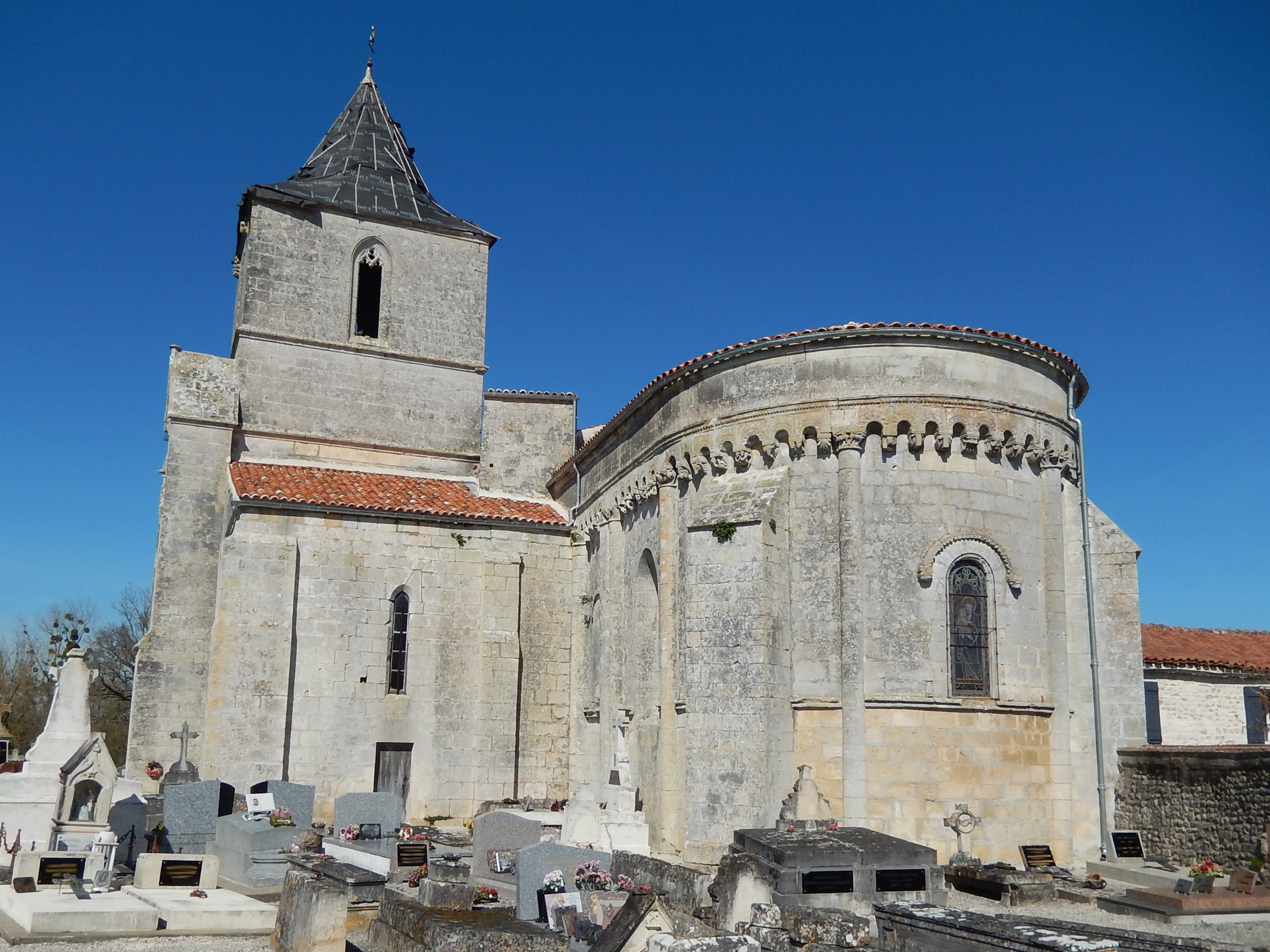 La façade sud-est de l'église Saint Pierre de Champdolent (Charente-Maritime, France).